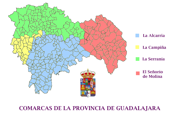 Comarcas de la provincia de Guadalajara